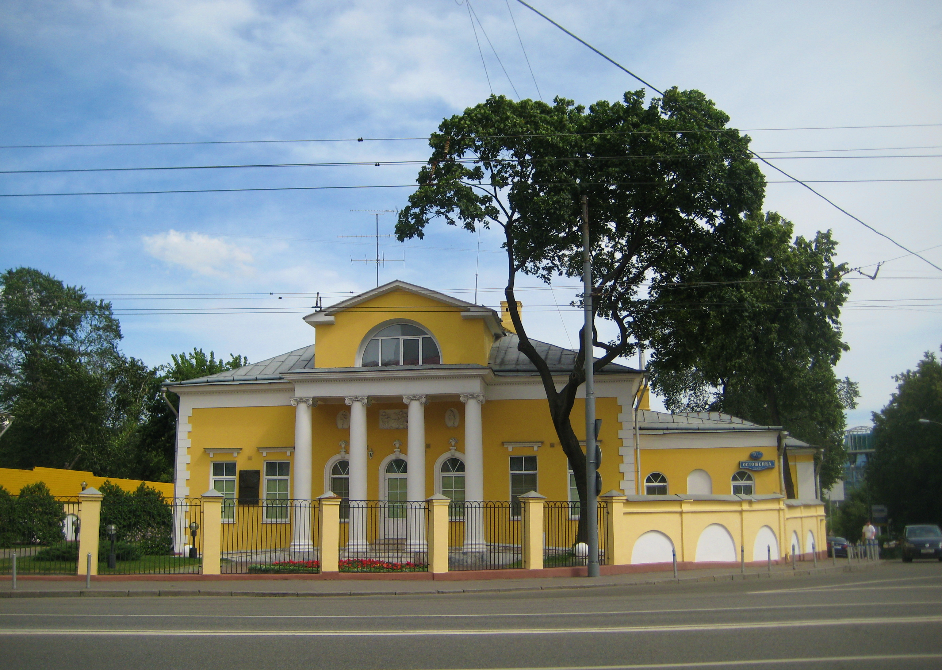 Главный дом усадьбы Н. О. Косыревой - Абрикосовых